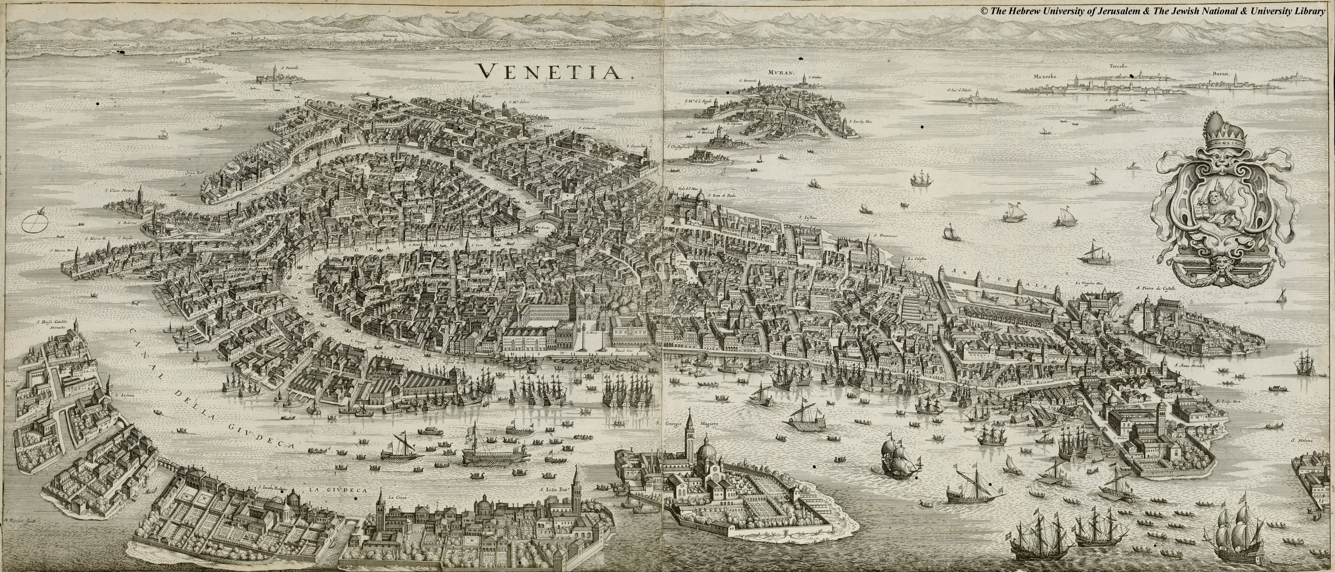 Venezia c. 1650. Copperengraving 30 x 71 cm, incompleted.